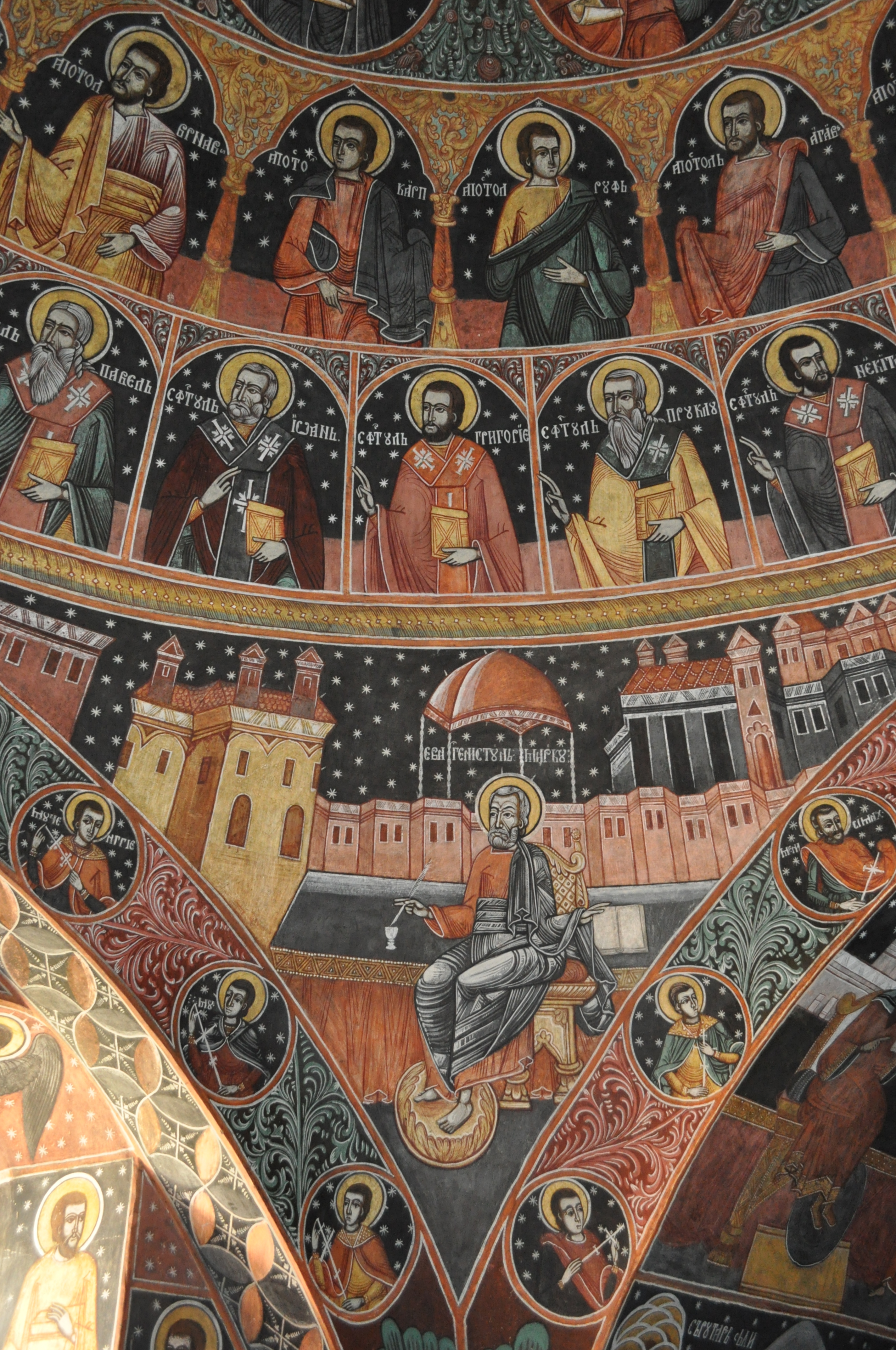 Biserica "Adormirea Maicii Domnului", sat Arpașu de Sus; comuna Arpașu de Jos, județul Sibiu